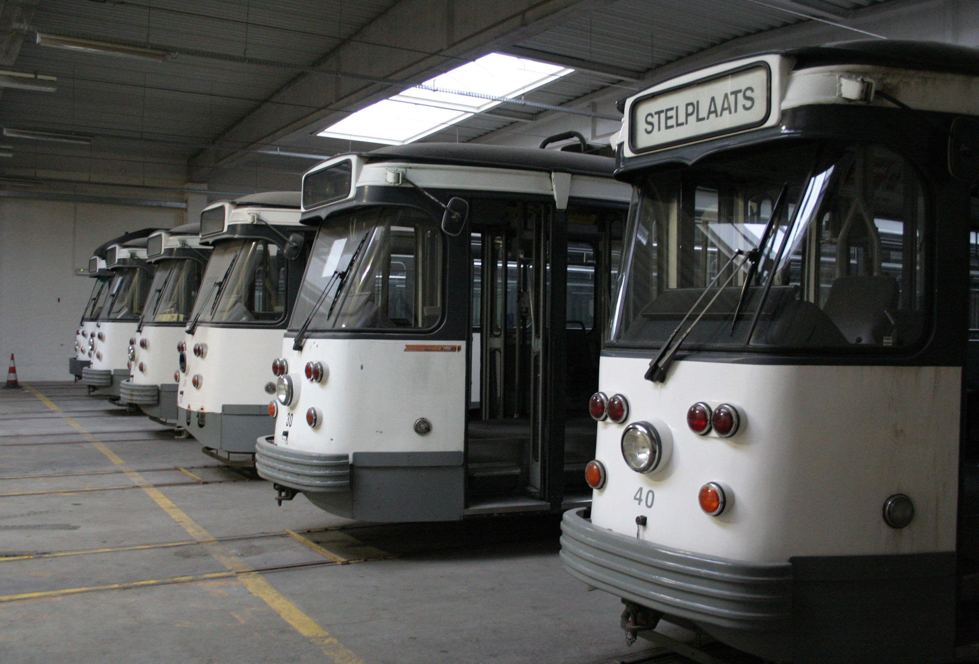 Buitendienstgestelde PCC trams in Gent.